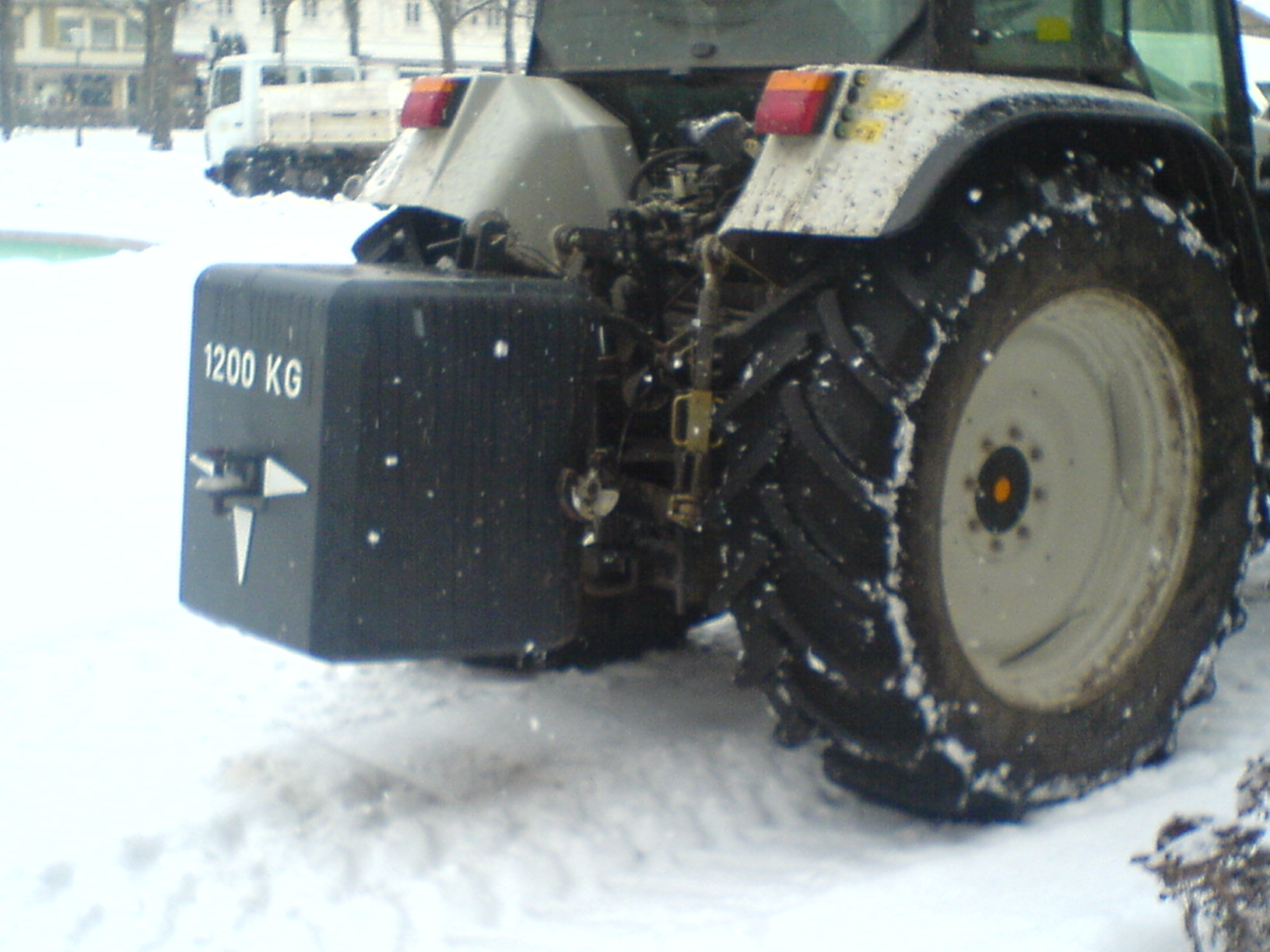 „Gegengewicht“ – Steyr-Traktor 9094 mit Heckballastierung, gesehen in Bad Kissingen.